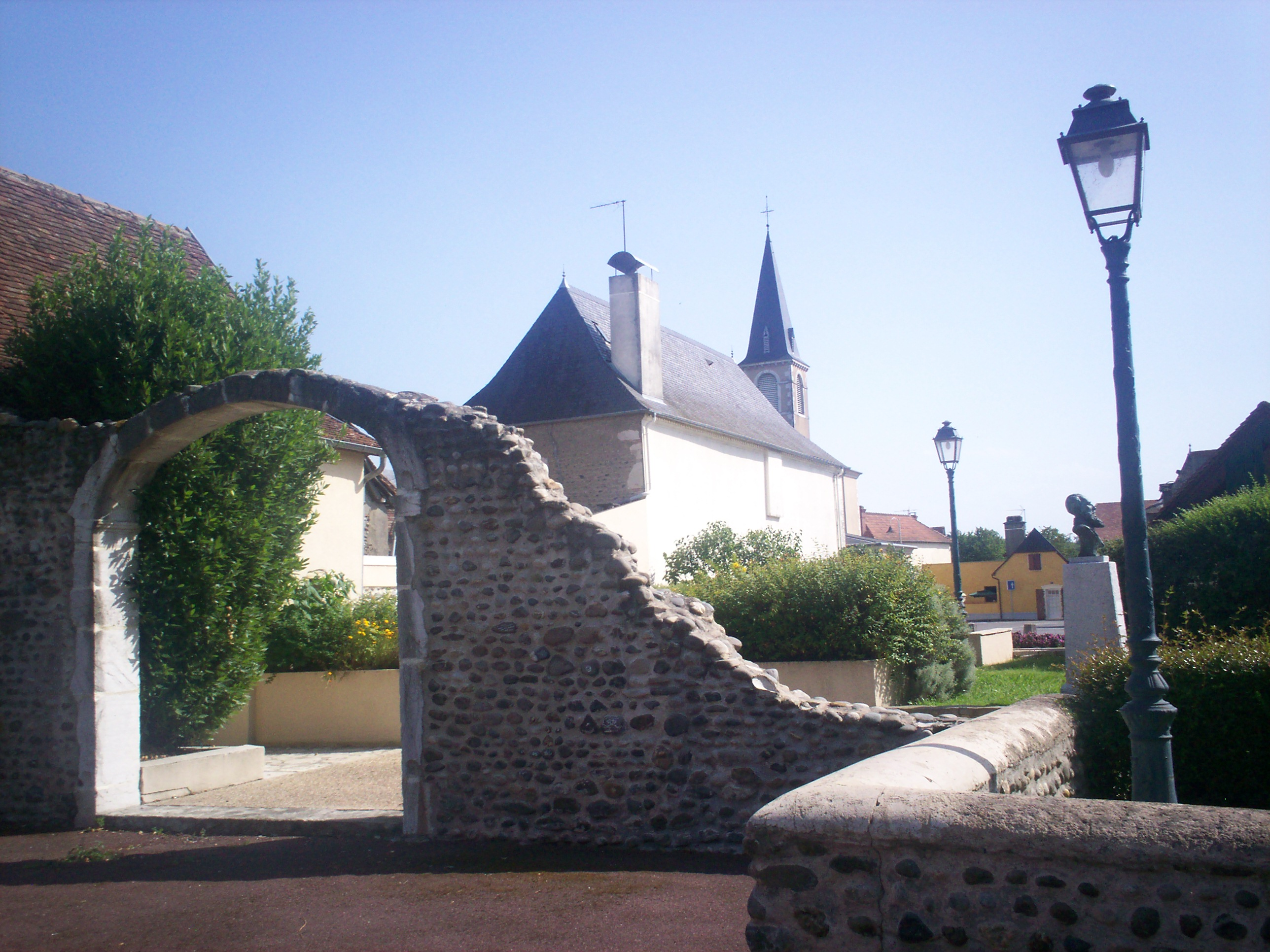 Fotografia personala